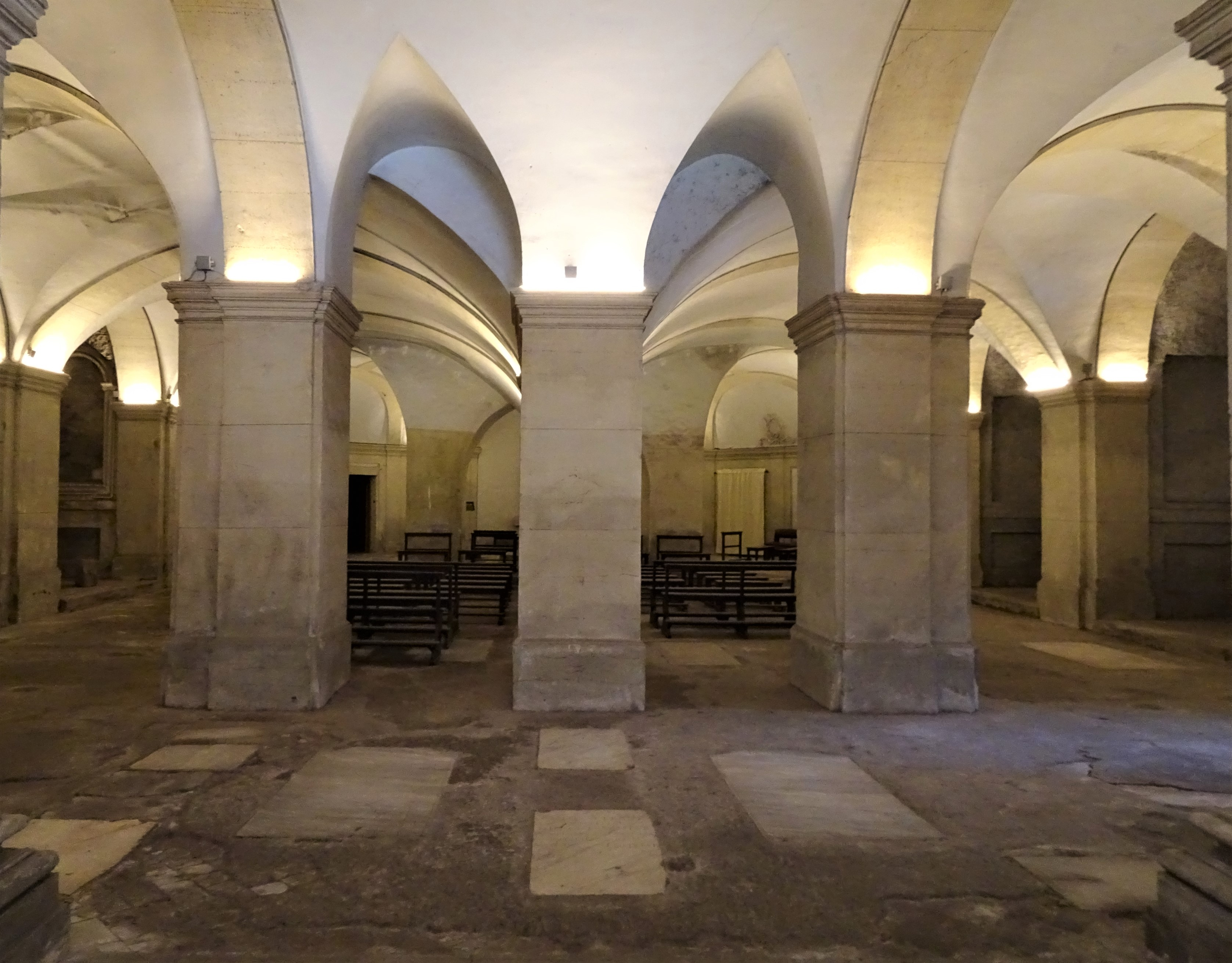 foto genomen van achteraan in de crypte. De pilasters in het midden werden in de 17e eeuw toegevoegd om de vloer van de verhoogde (boven)kerk te ondersteunen.